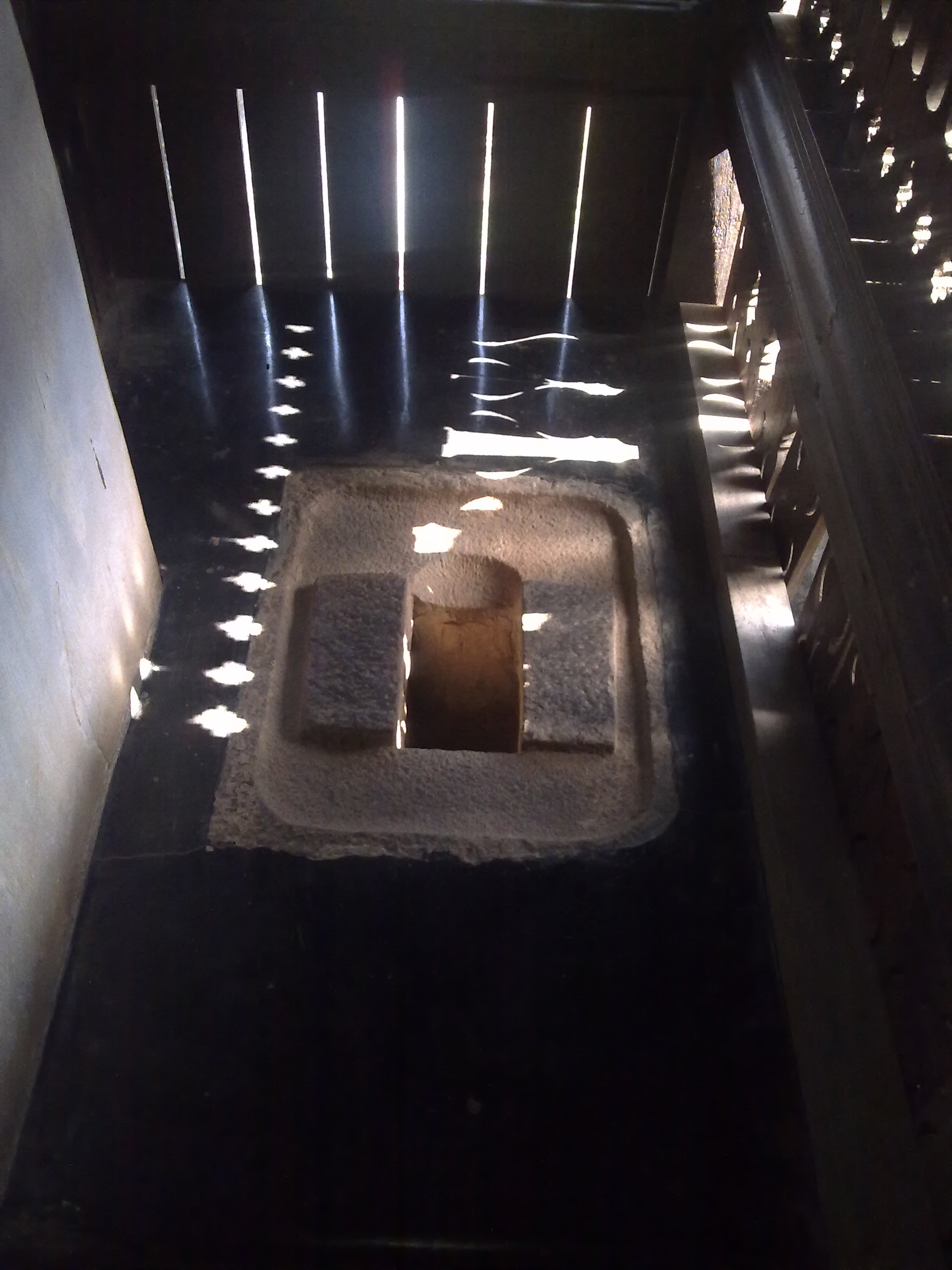 പത്മനാഭപുരം കൊട്ടാരത്തിലെ കരിങ്കല്ലു കൊണ്ടുള്ള ശൗചാലയം